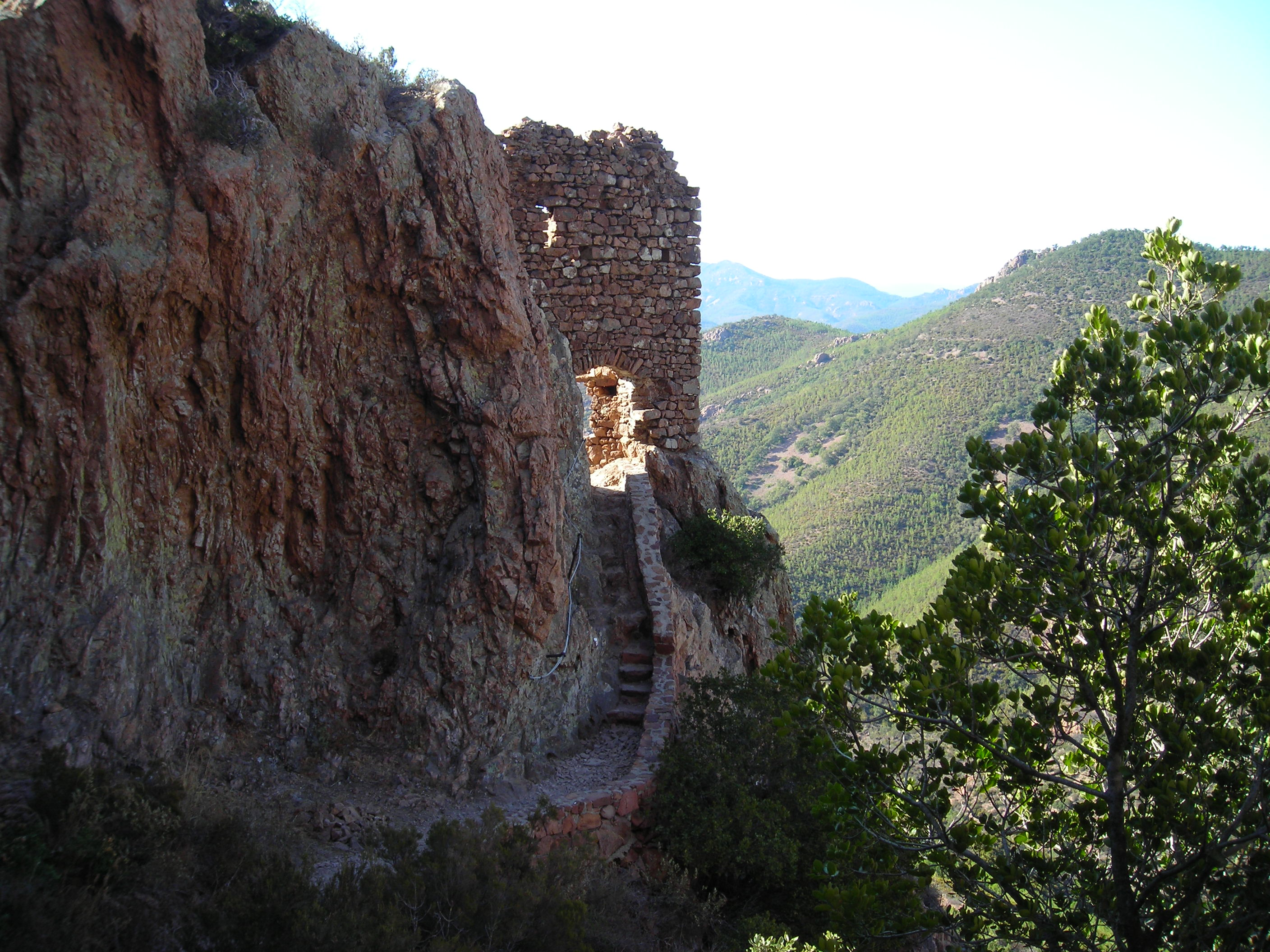 Voie d'acces à la grotte de saint honorat (saint beaume)